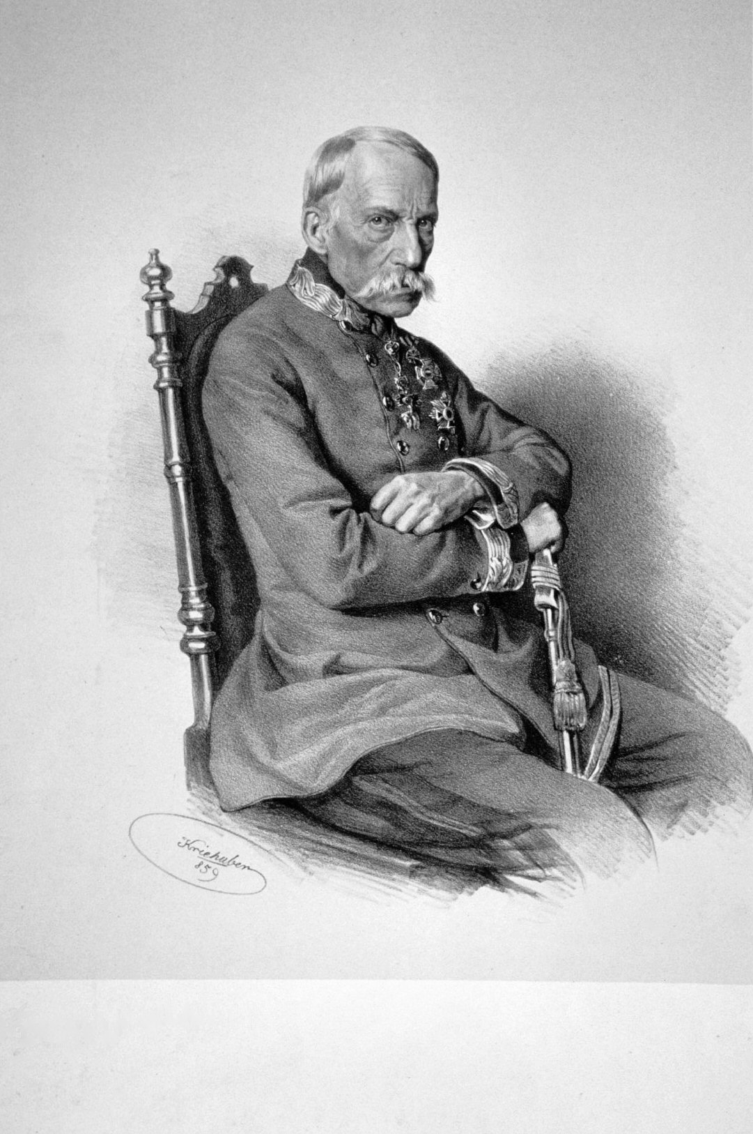 Erzherzog Johann Baptist kurz vor seinem Tod, 1859